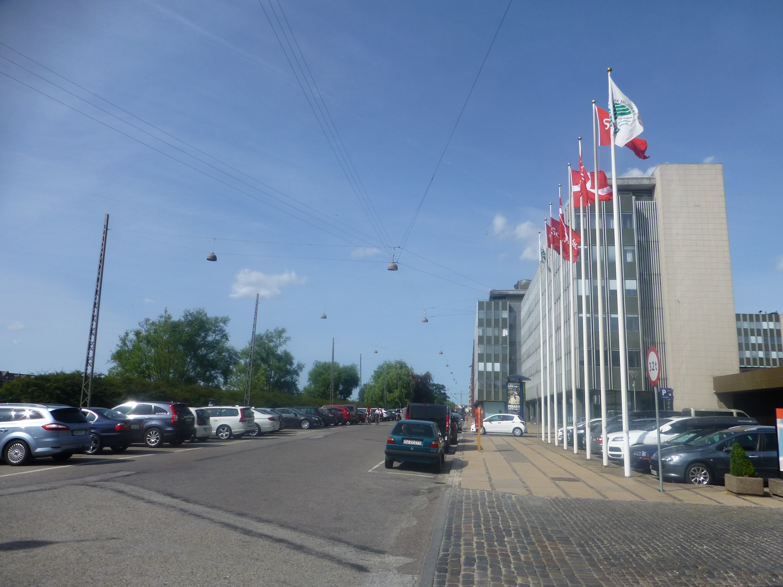 The street Vester Søgade in Vesterbro in Copenhagen.